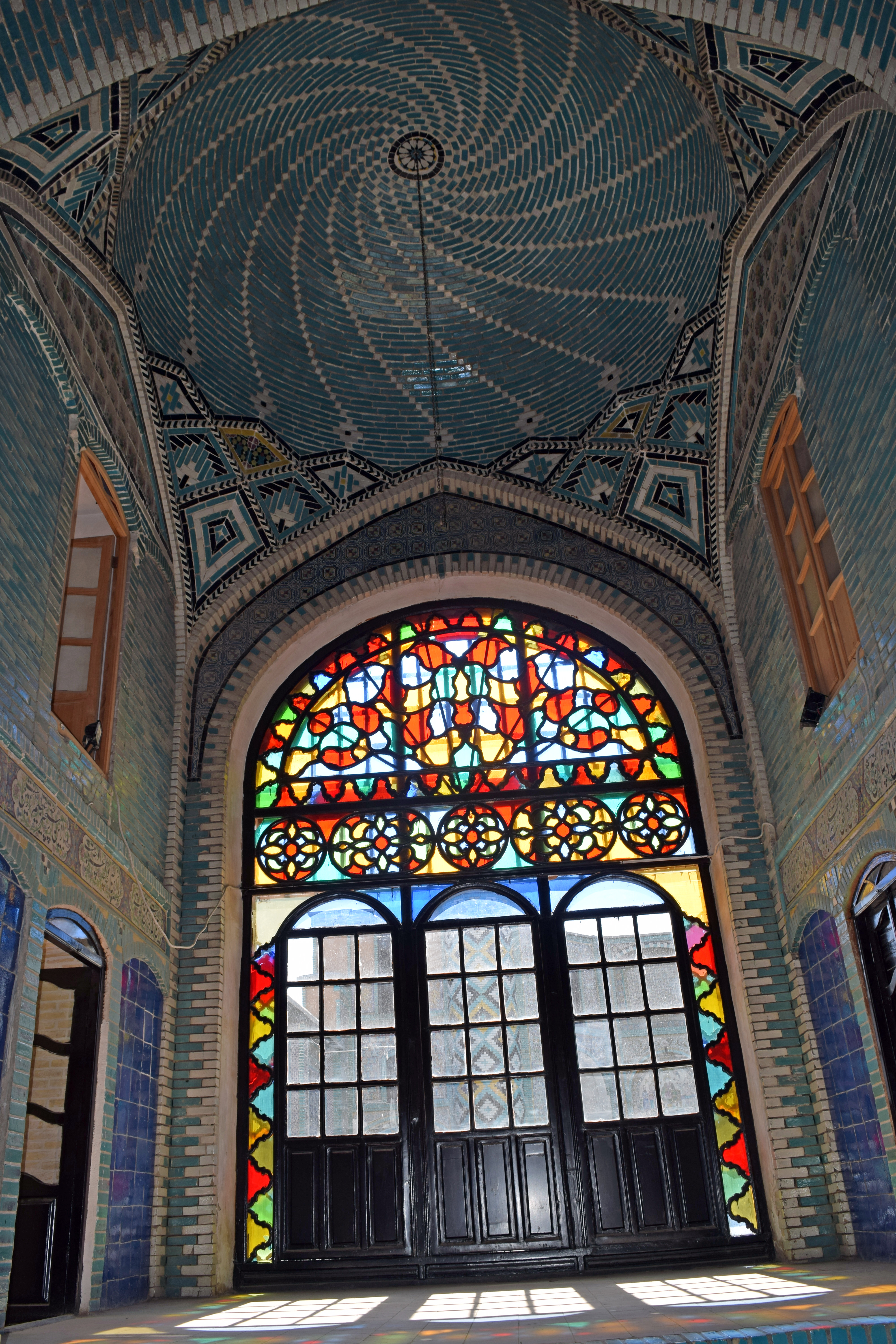 مجموعه بناهای تکیه معاون‌الملک